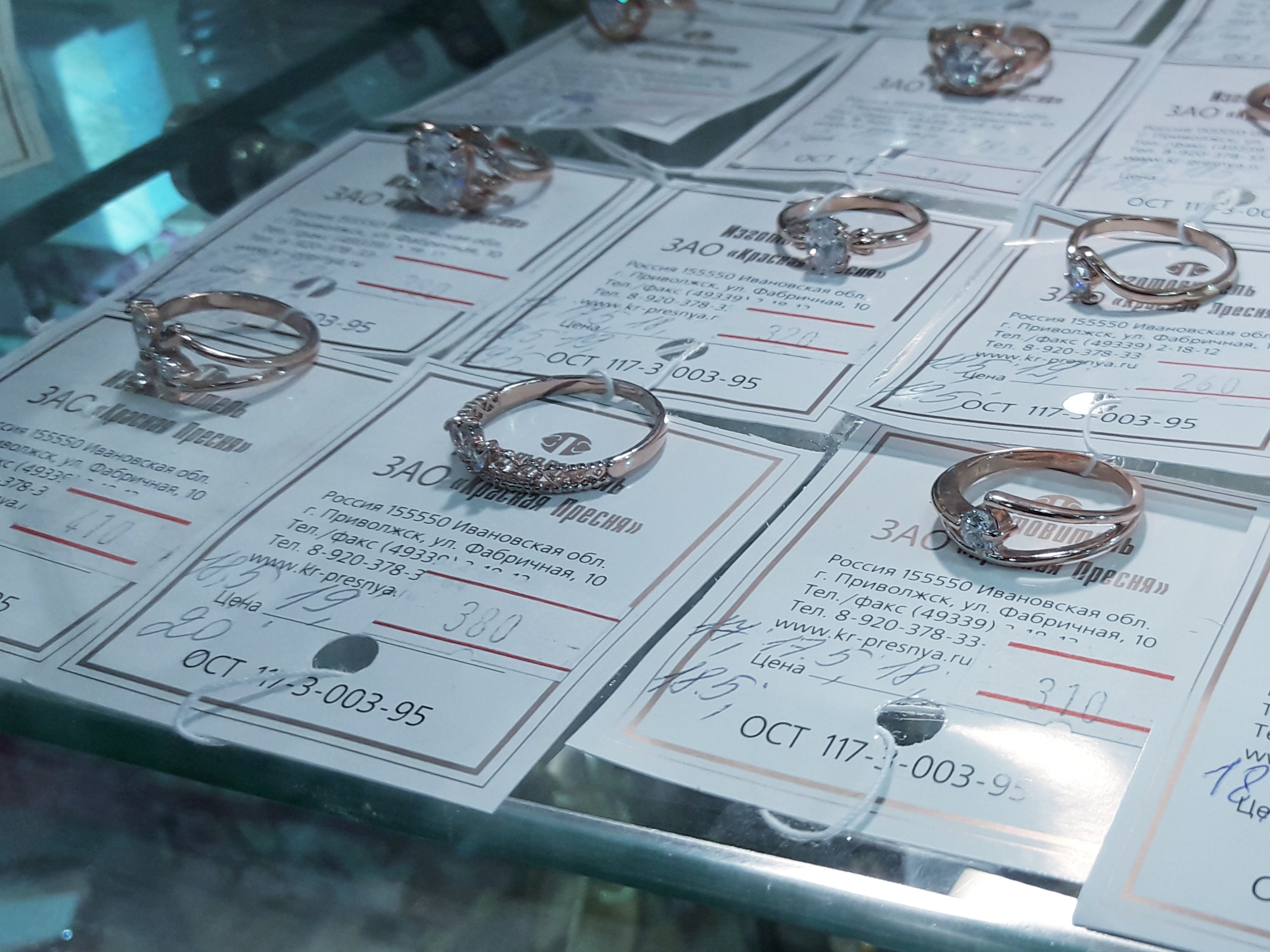 Бижутерия производства завода Красная Пресня в магазине